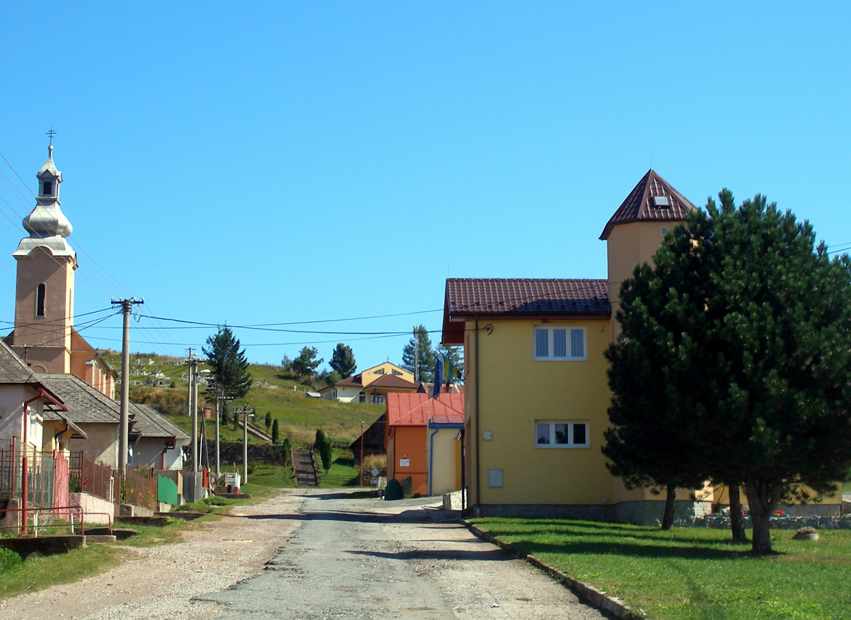 Spišská obec Závadka okres Gelnica.